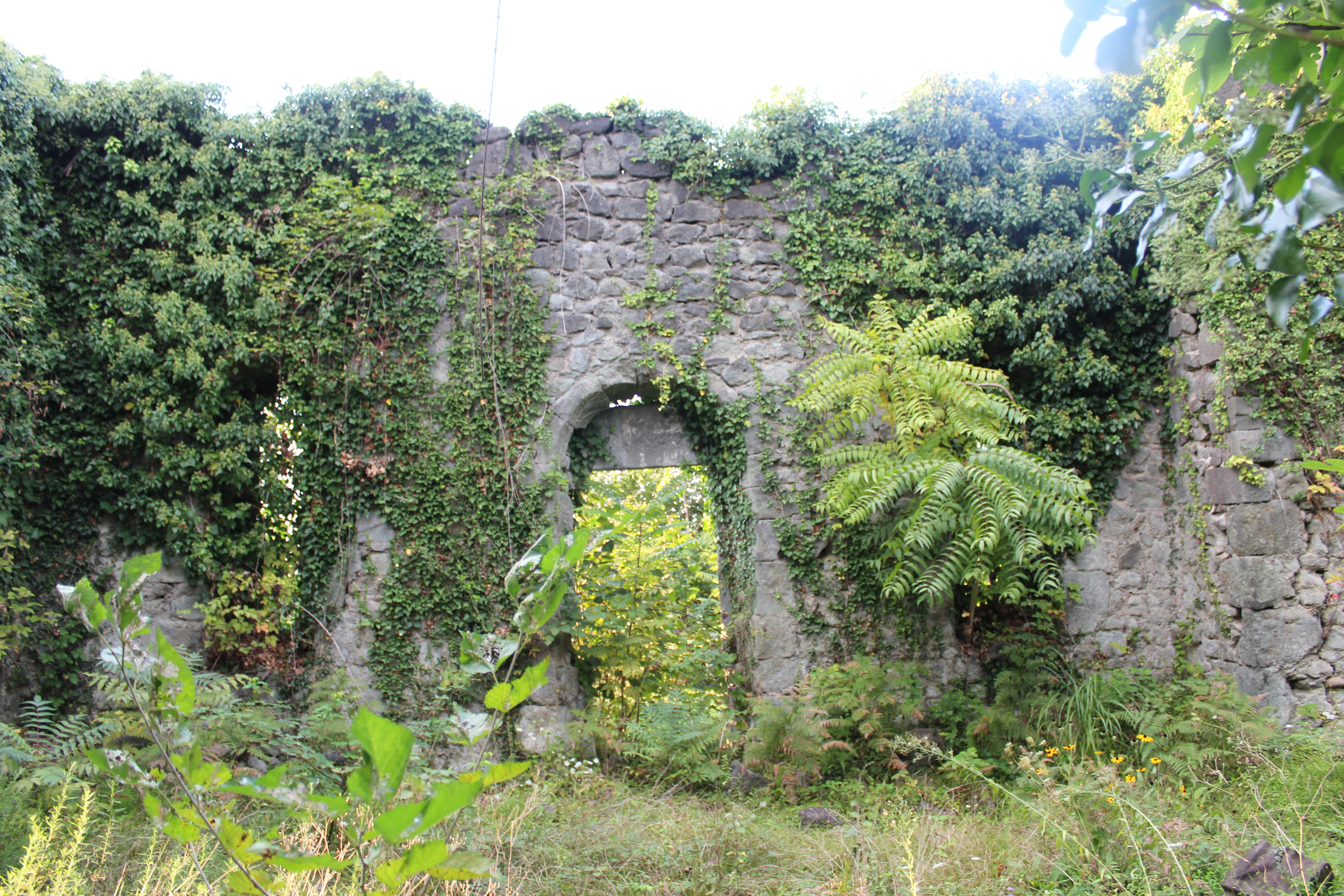 ძლევისკარის ეკლესიის ნანგრევები, სოფელი ცხემლისხიდი